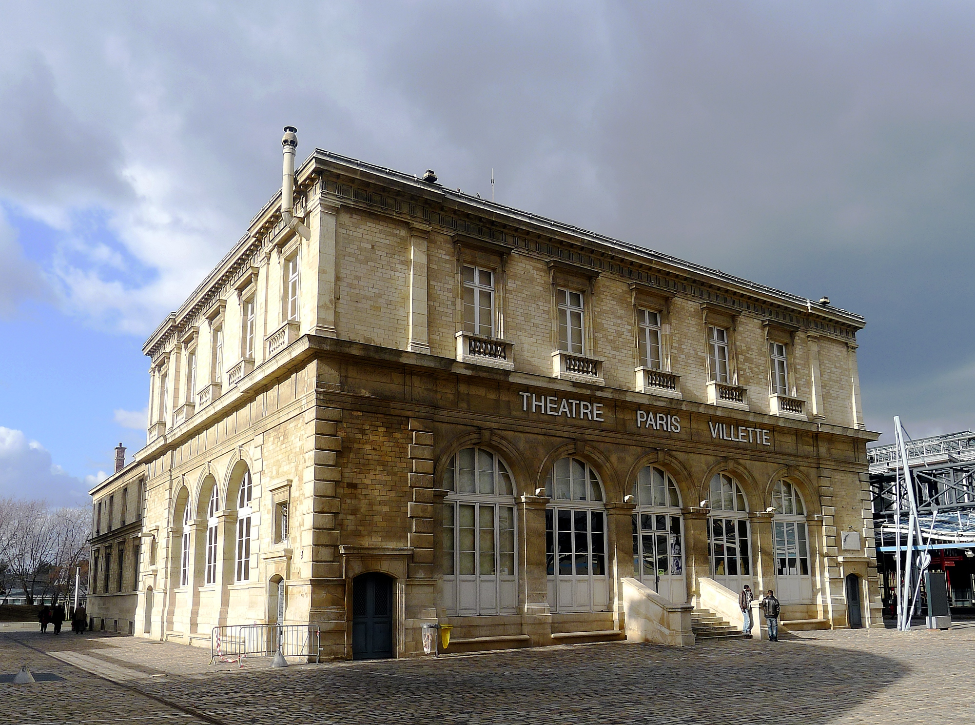 Théâtre Paris-Villette - Paris XIX